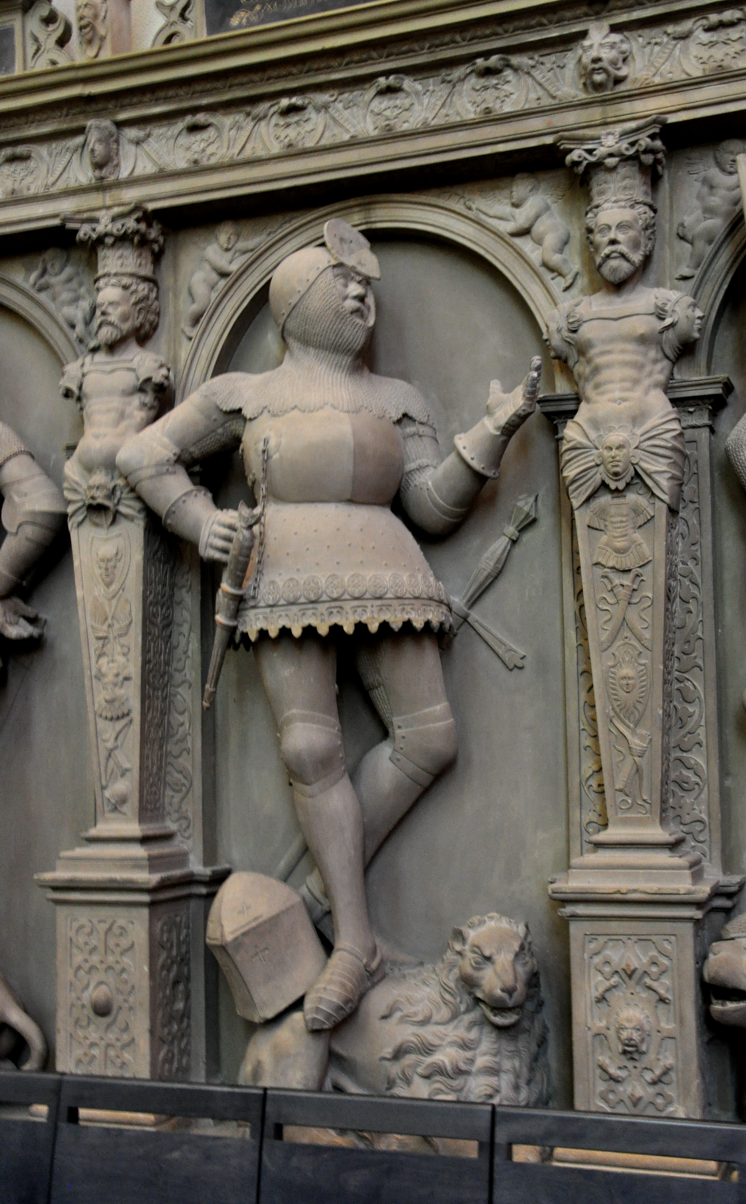 Stuttgart, Chor der Stiftskirche, Grafenstandbilder von Sem Schlör (ab 1576 entstanden zum Ersatz der ursprünglichen Epitaphe der in der Stiftskirche beigesetzten Grafen von Württemberg) Figur 5: Ulrich IV. (†1366)